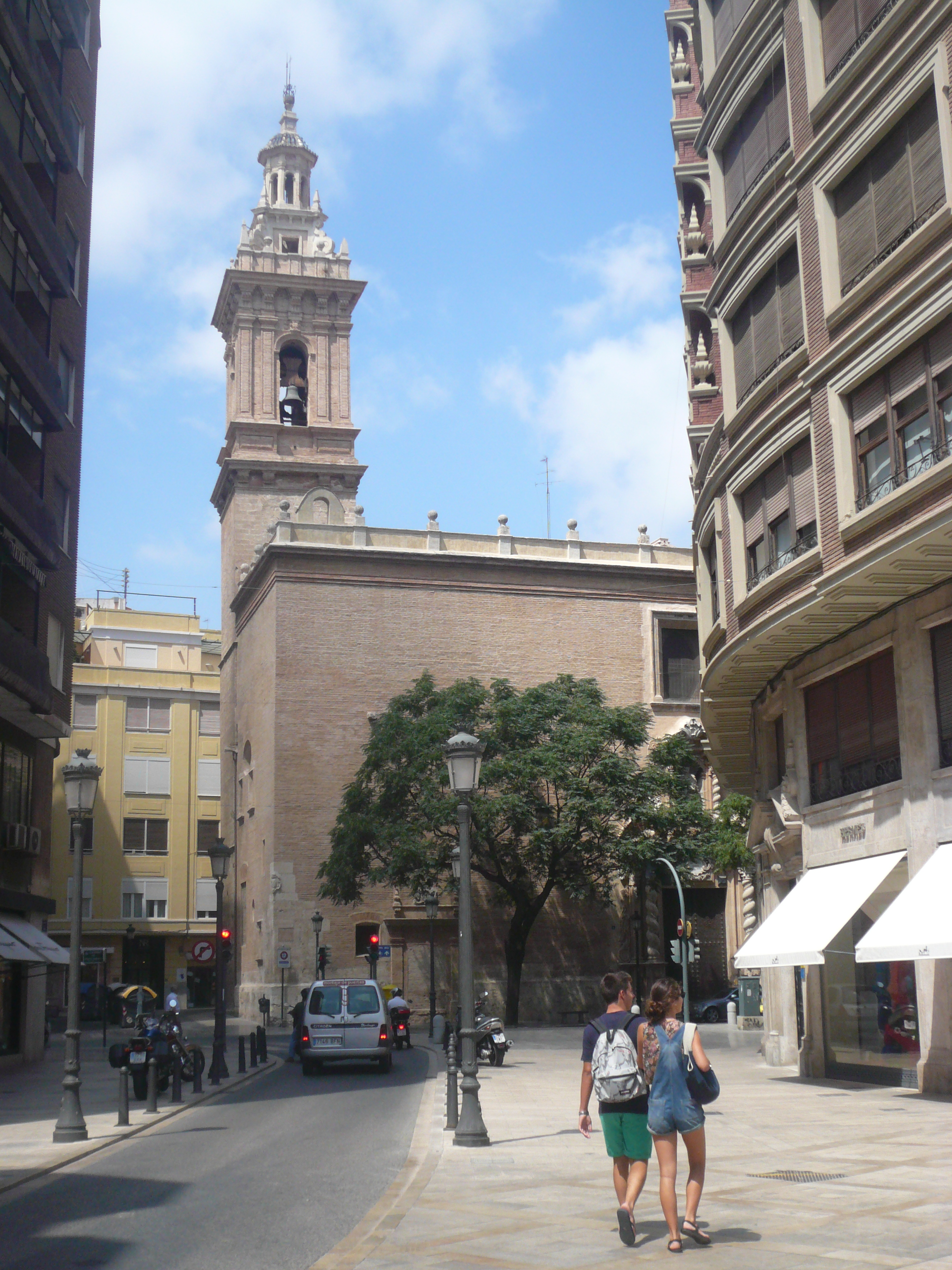 Església de Sant Joan de la Creu (València) Object location39° 28′ 19.54″ N, 0° 22′ 28.69″ W